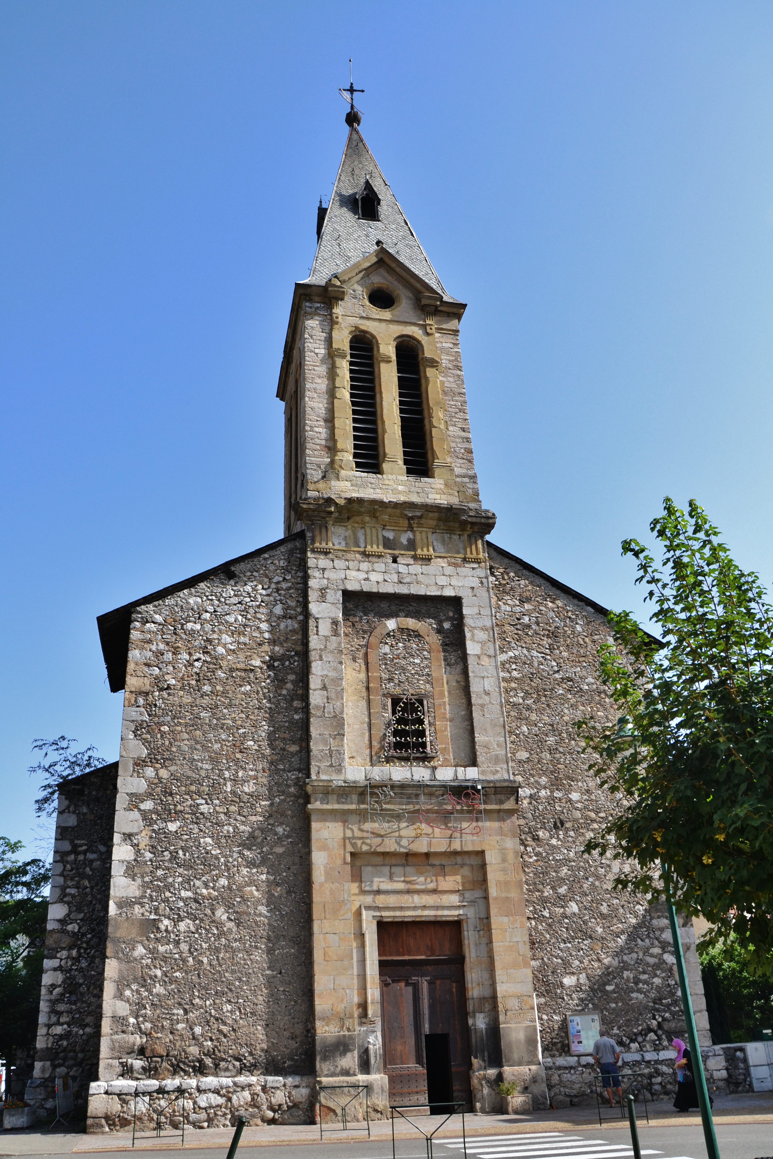 L'église Sainte-Quitterie de Tarascon-sur-Ariège (Ariège, France)